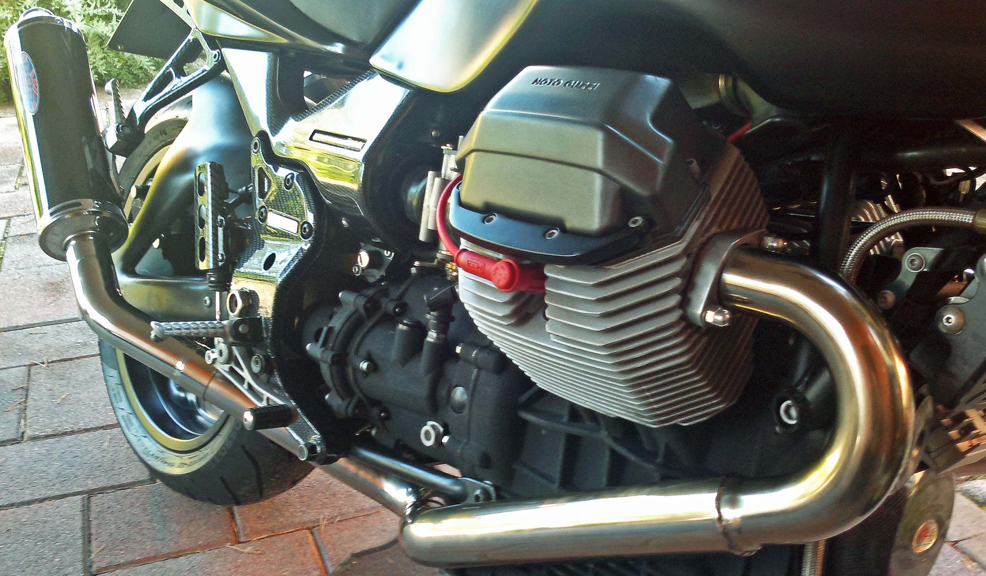 V11 ja sen iso V2 moottori